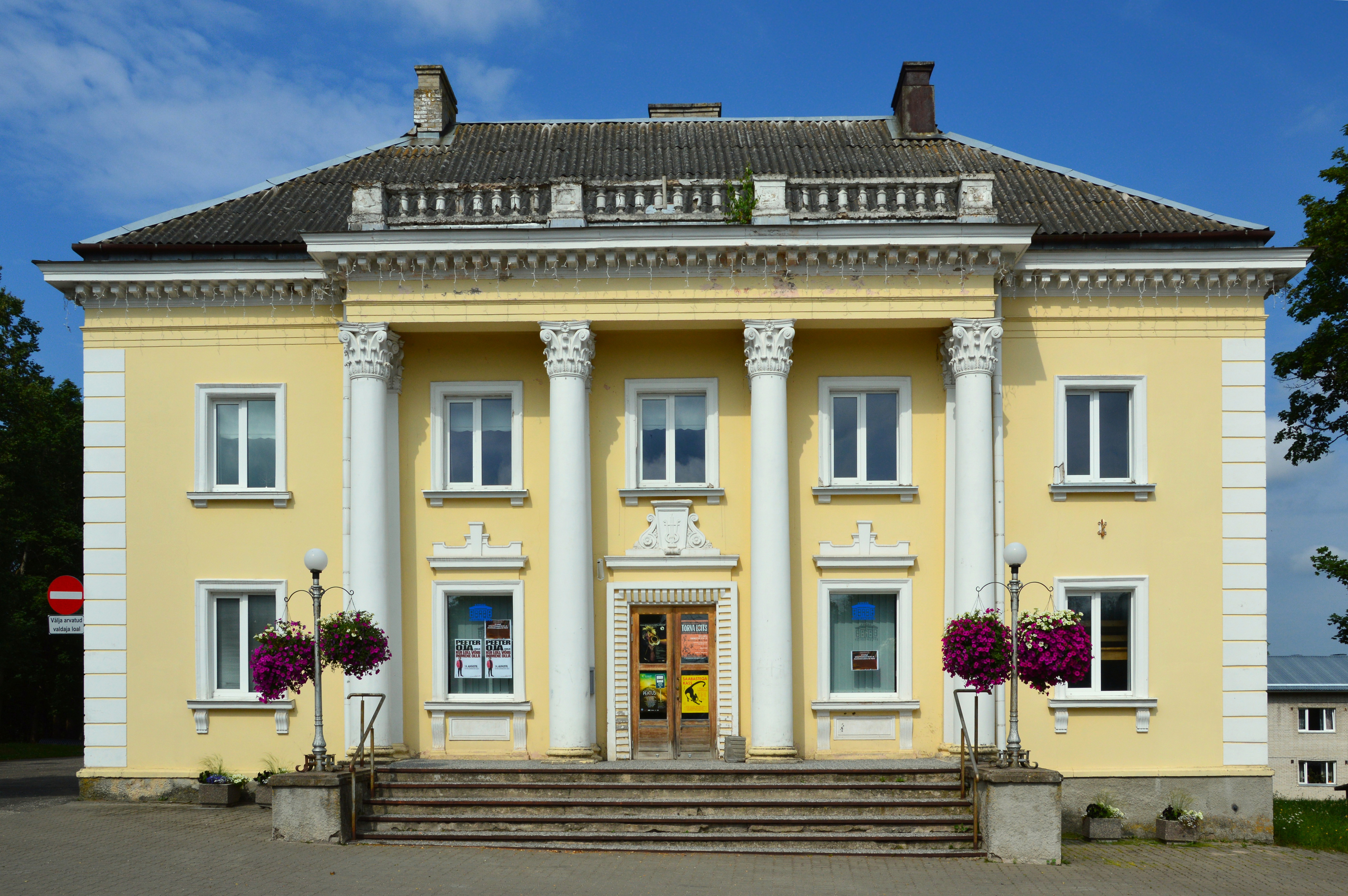 Otepää kultuurimaja